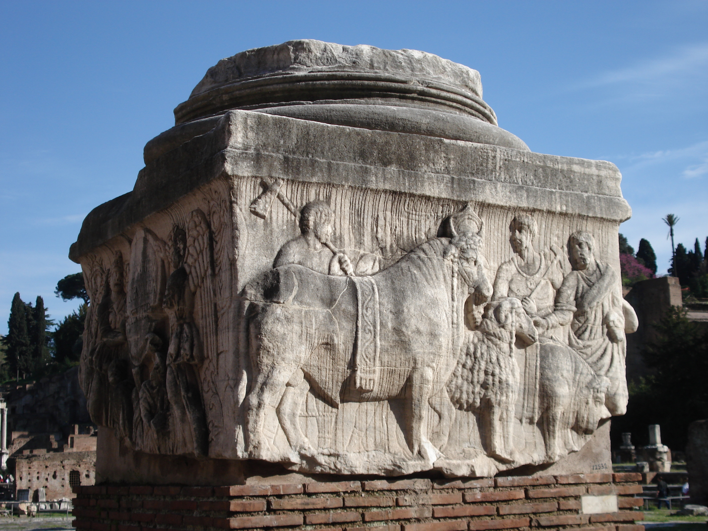 Decenallienbasis, Forum Romanum